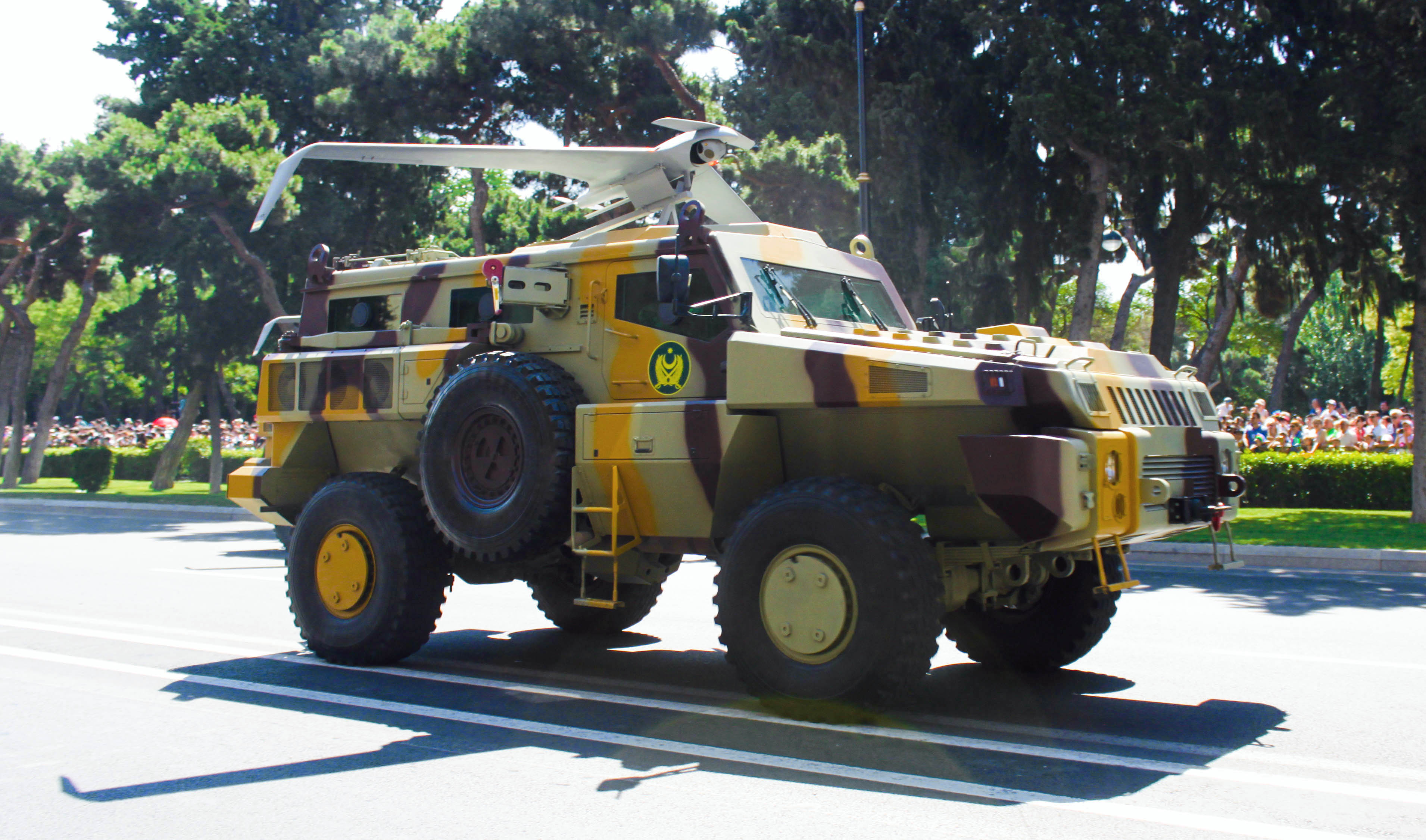 Military parade 2018